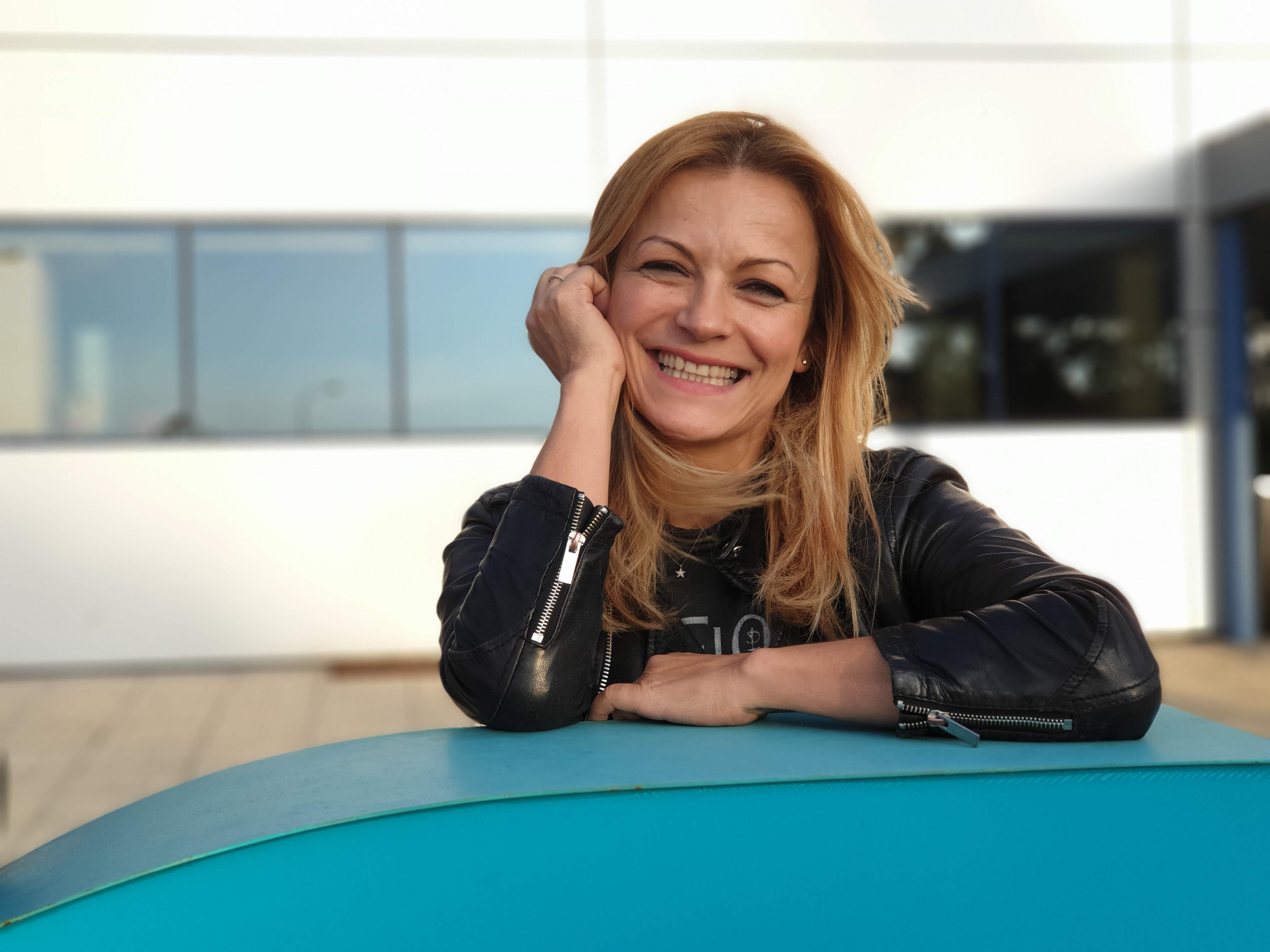 A actriz Isabel Blanco na entrada do edificio da CRTVG